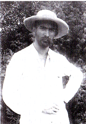 Künstler Heinrich Gesemann, Enkirch